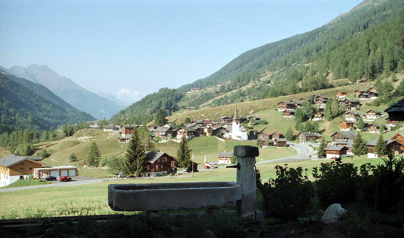 Blick von Ritzingen auf Biel